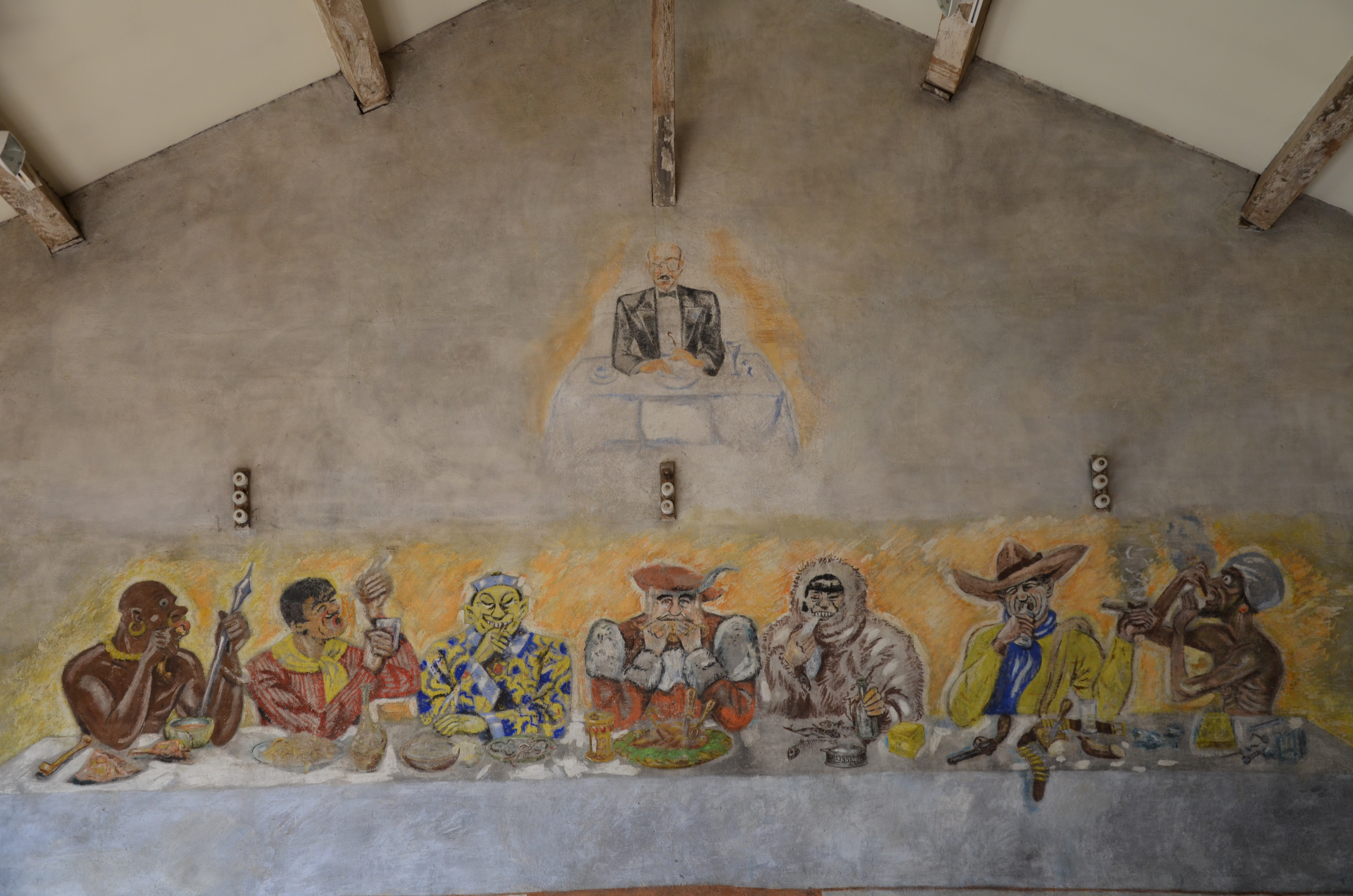 Fresque au camp des Milles